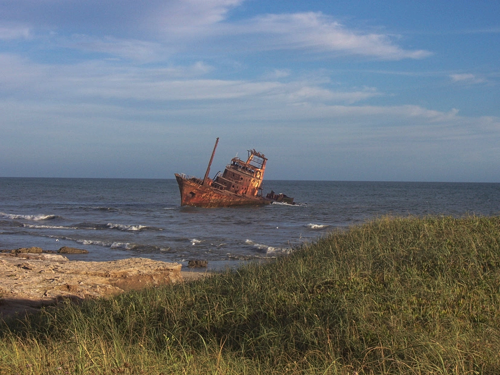 El barco encallado en la Bahía de los Vientos, en Quequén, Argentina.